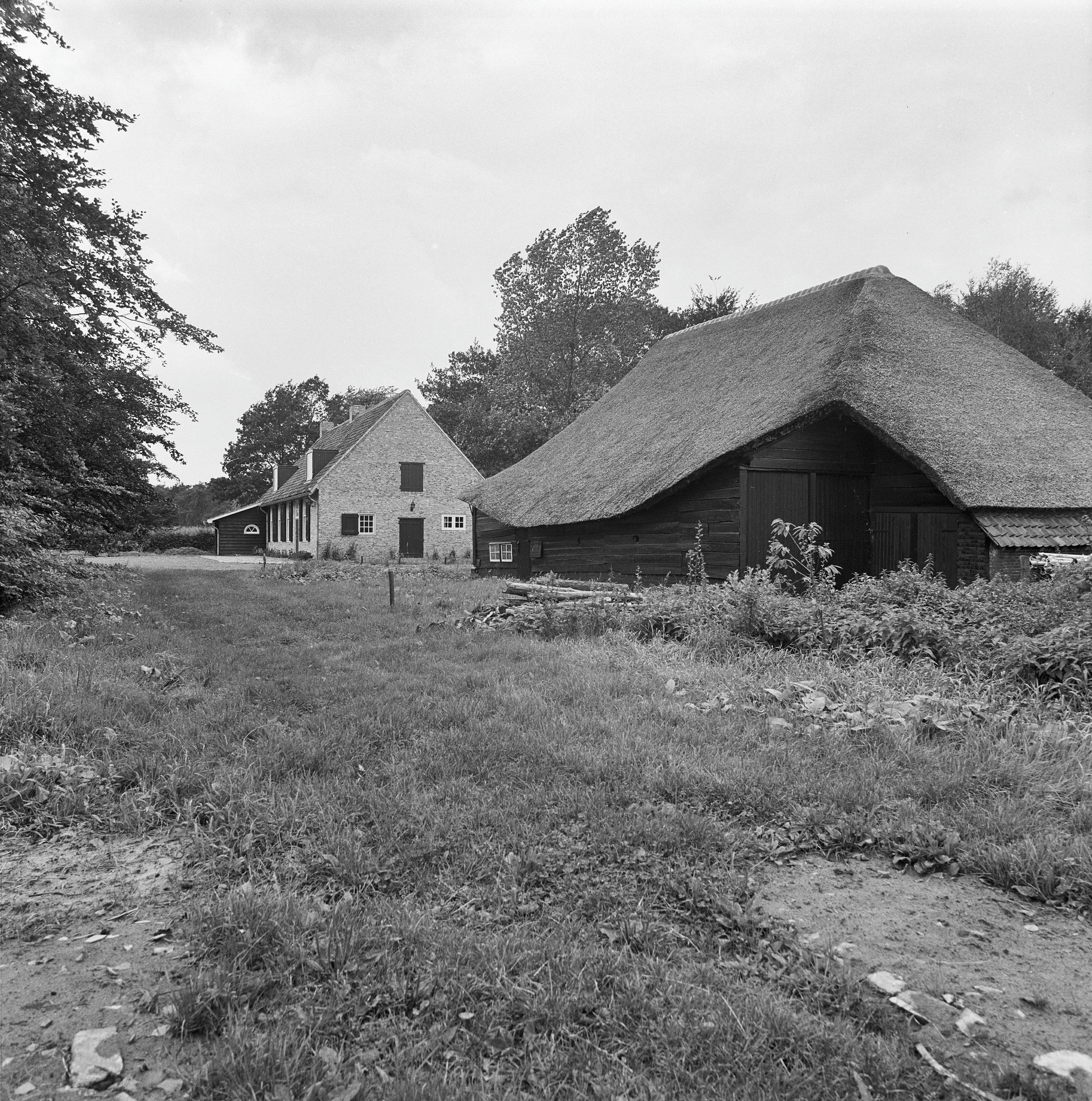 De Drie Zwaantjes: overzicht